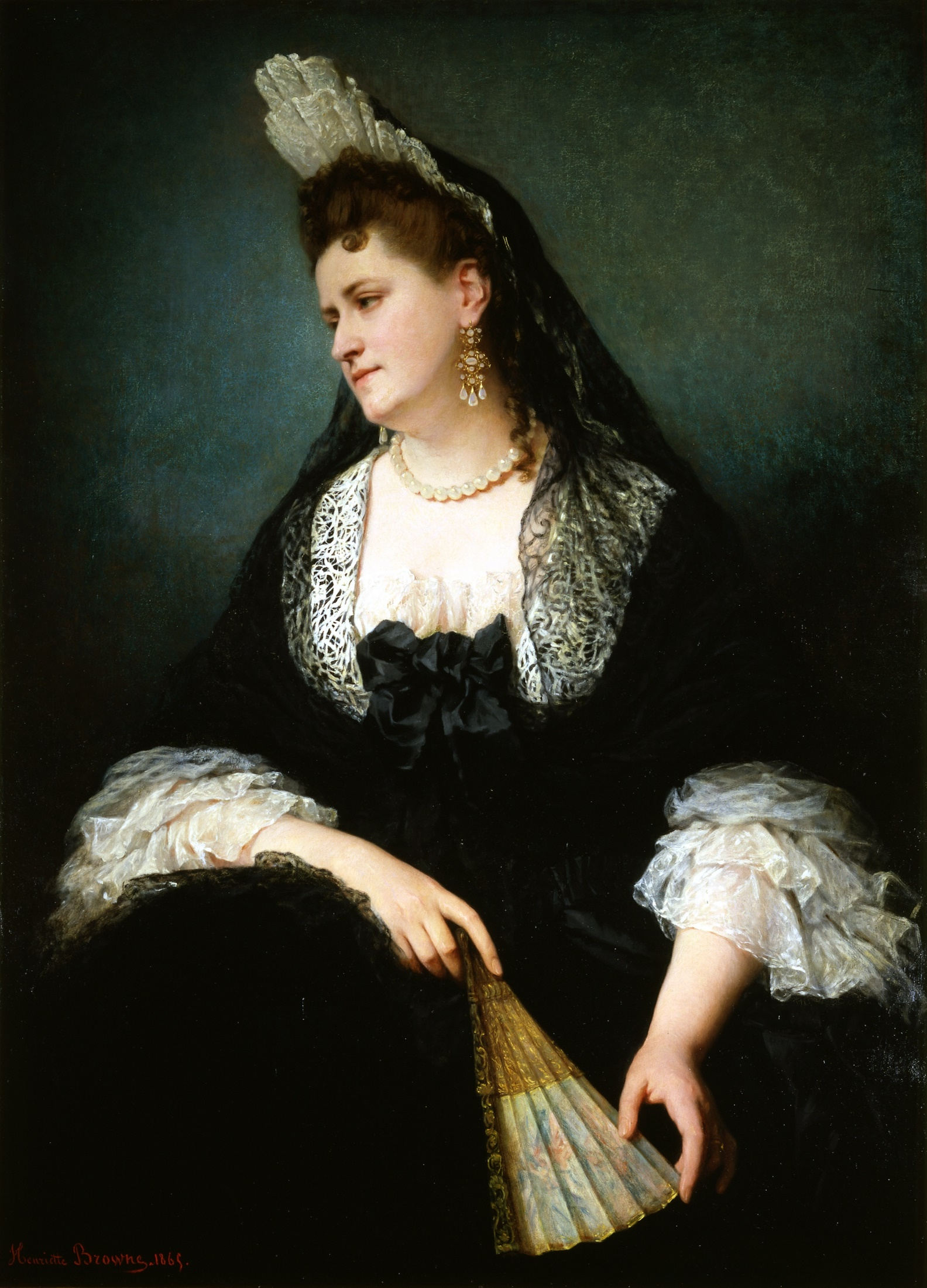 Henriette Browne, Retrato de madame Anselma, 1865. Óleo sobre lienzo, 129 x 95 cm, Madrid, Real Academia de Bellas Artes de San Fernando. Firmado "Henriette Browne 1865"